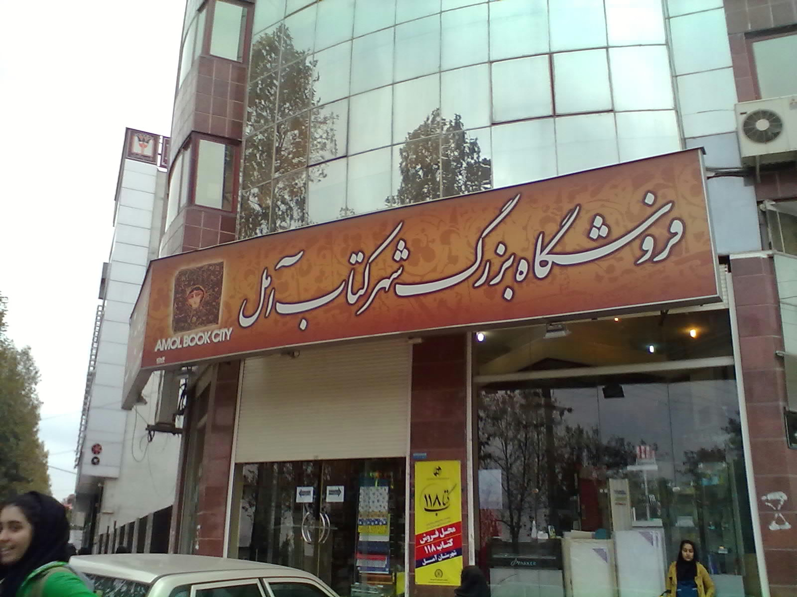 فروشگاه کتاب شهر آمل